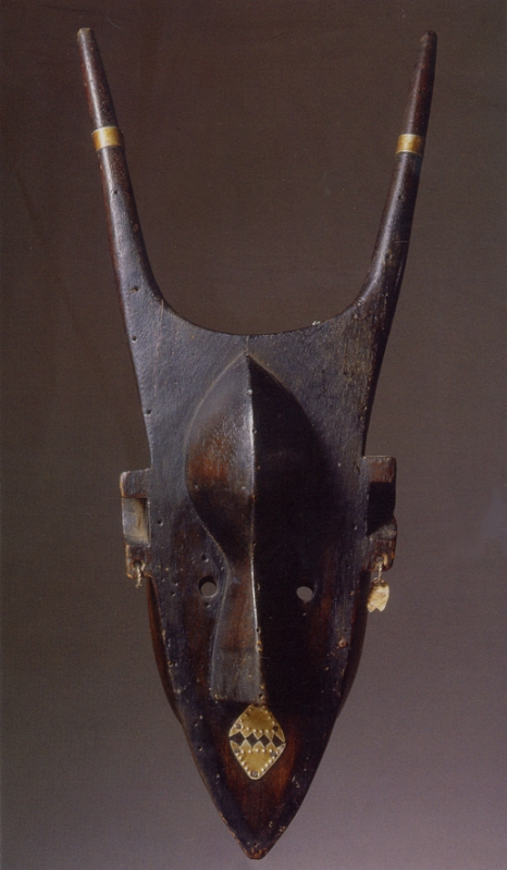 Maschera Ntomo - Maschera facciale antropozoomorfa costituita da un piano di forma tendenzialmente triangolare, con estremità inferiore appuntita (mento) e sommità che termina con corna cilindriche divergenti su cui sono stati infilati anelli di metallo. Al centro si leva il volume della fronte e del naso ai cui lati stanno due piccoli occhi rotondi forati. La bocca chiara di forma romboidale contrasta con la superficie scura dell'insieme e nel contempo riprende e accompagna il mento triangolare. Ai lati orecchie ad arco di cerchio con orecchini. Queste maschere sono utilizzate nell'ambito della società Ntomo, che rappresenta il primo gradino (quello dei ragazzi non ancora circoncisi) del percorso iniziatico bamana strutturato per classi d'età. La maschera ntomo è l'immagine dell'uomo così come è uscito dalle mani di Dio. Elemento centrale sono le corna il cui numero indica il sesso della maschera: maschile se le corna sono tre o sei, femminile se sono quattro od otto, oppure androgina quando sono due, cinque o sette. Gli insegnamenti del Ntomo riguardano soprattutto il controllo della parola e l'importanza del silenzio (Zahan 1960) anche nella sopportazione del dolore.